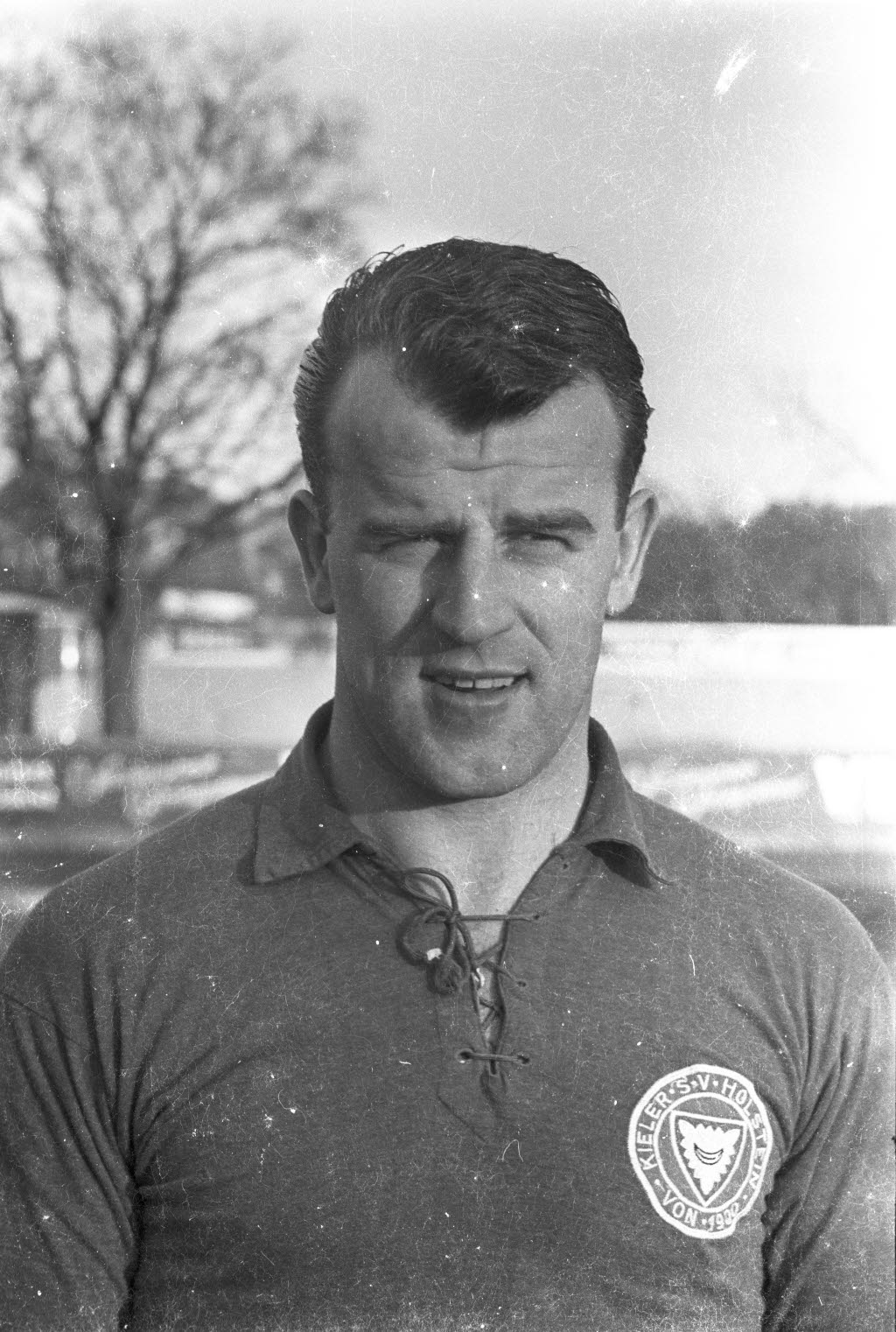 Fußballspieler von Holstein Kiel in der Saison 1964/1965.